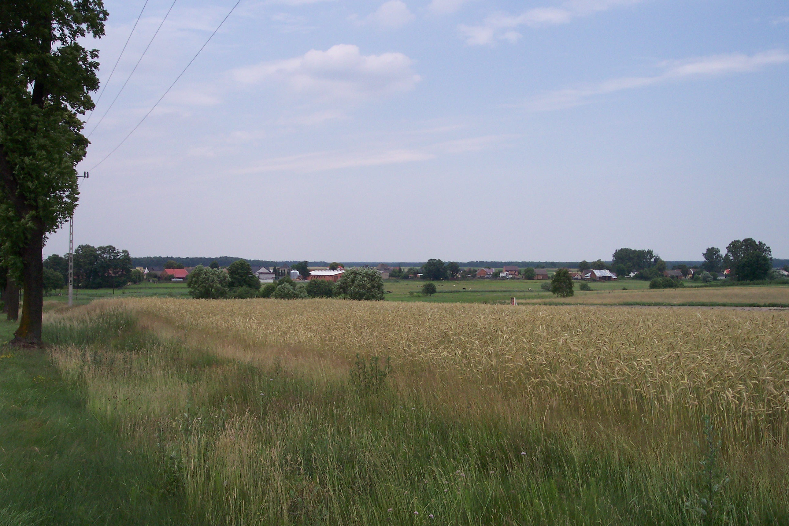 Warłów (oppelner Woiwodschaft) aus der Ferne